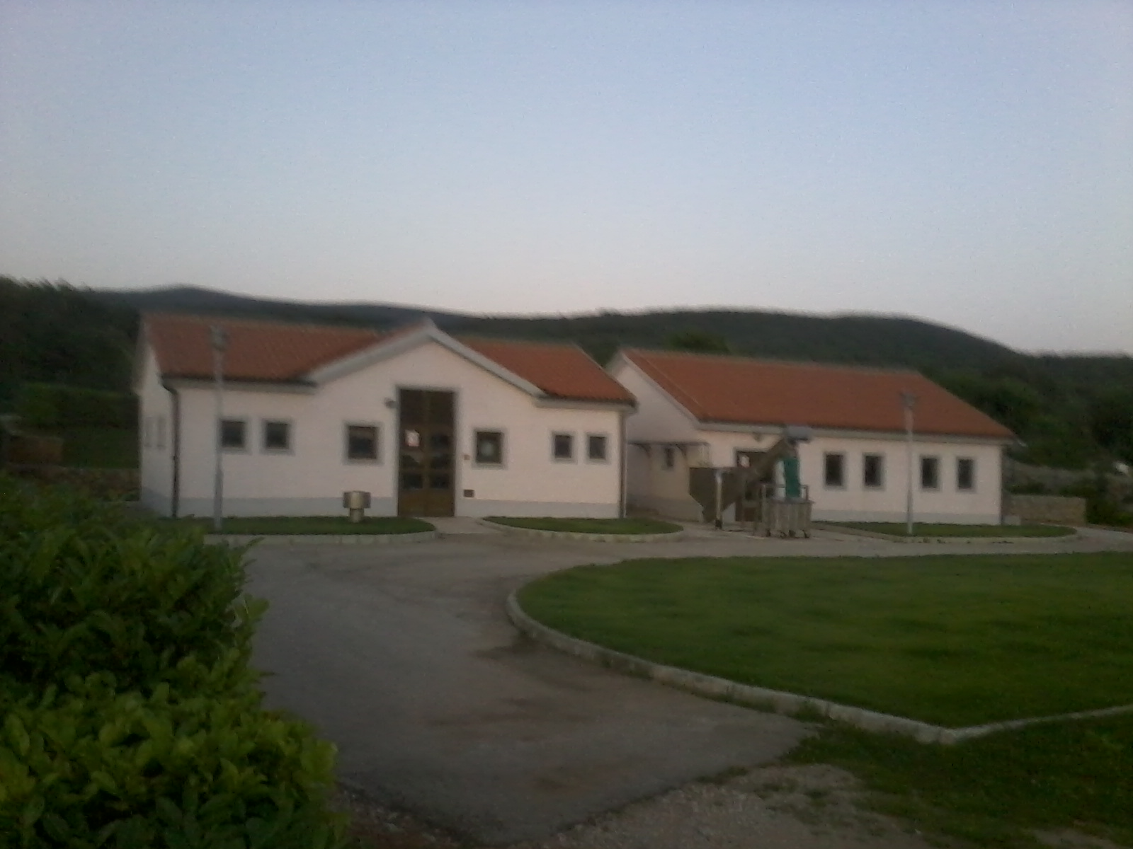 Pročiščivać otpadnih voda u Puntu na otoku Krku. Izgrađen 2002. godine.